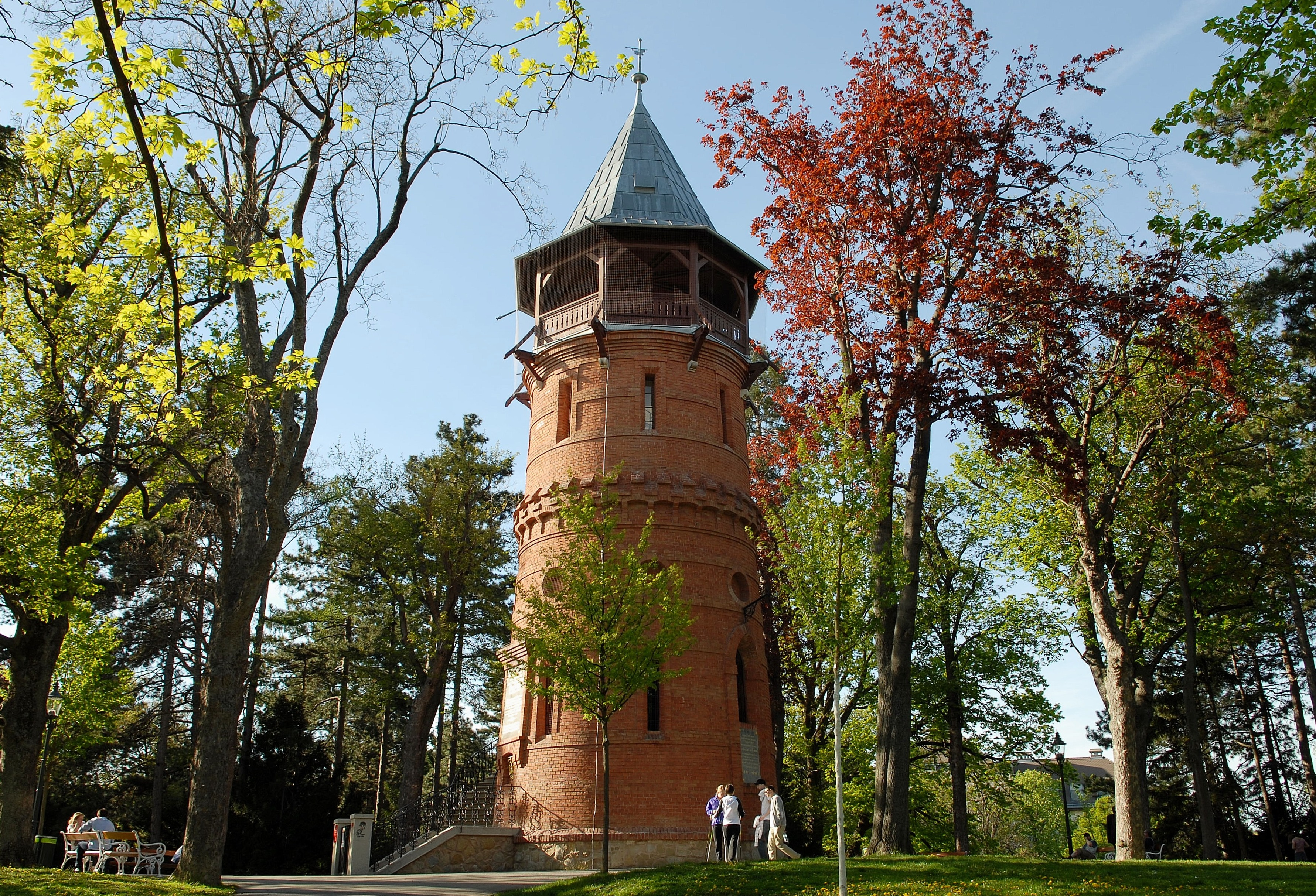 Paulinenwarte im Türkenschanzpark, 2012